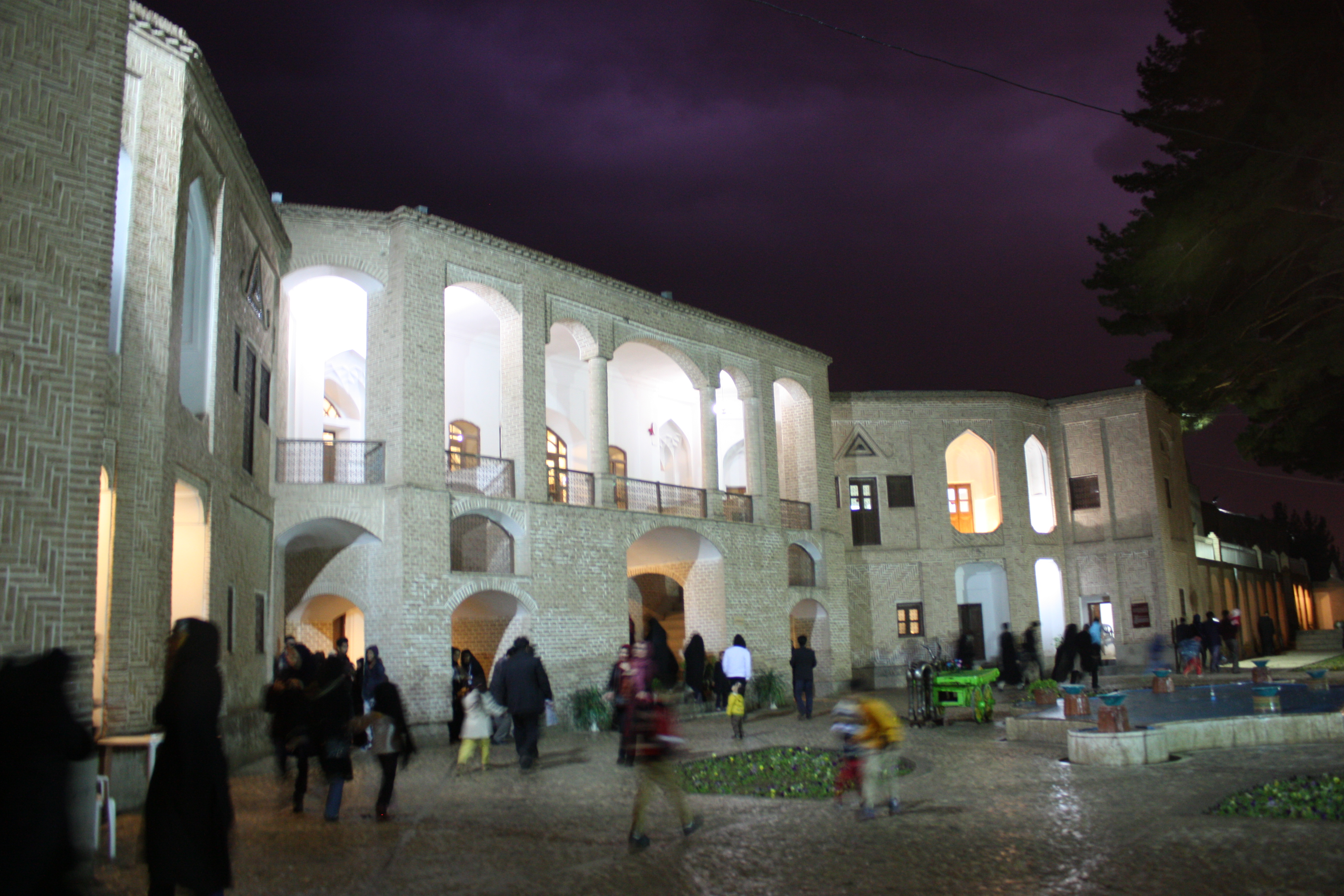 مجموعه اکبریه، مسجد و عمارت و باغ